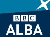 Toto je logo BBC Alba.